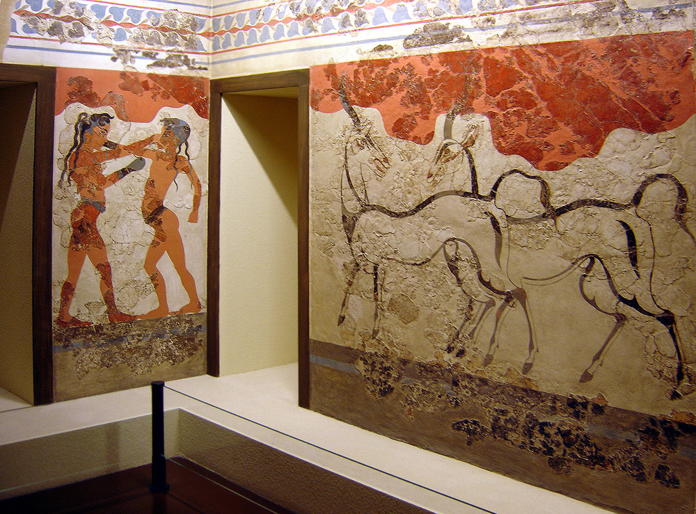 Akrotiri frescos in the National Archaeological Museum of Athens.